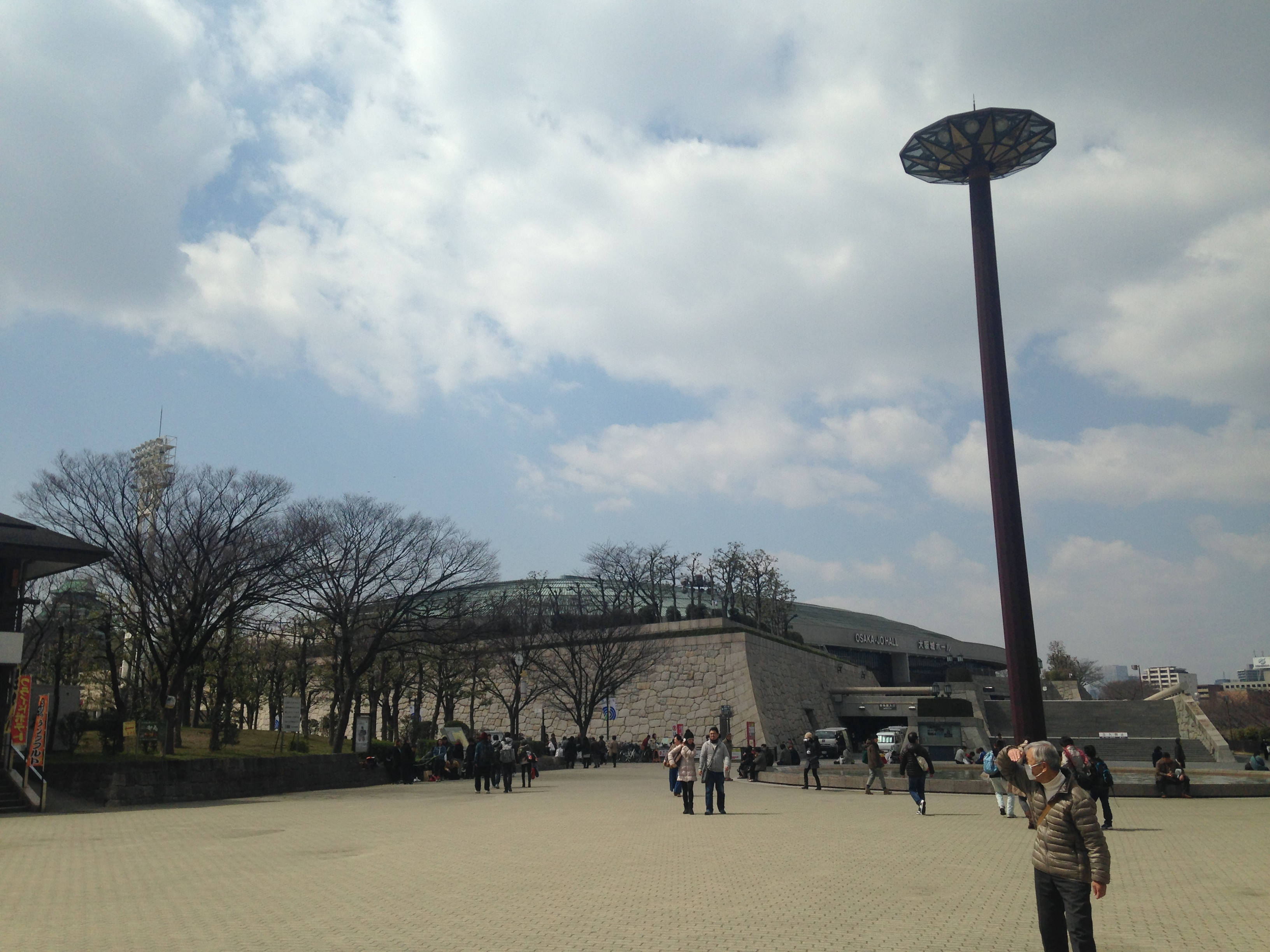 大阪城公園前の噴水と大阪城ホール